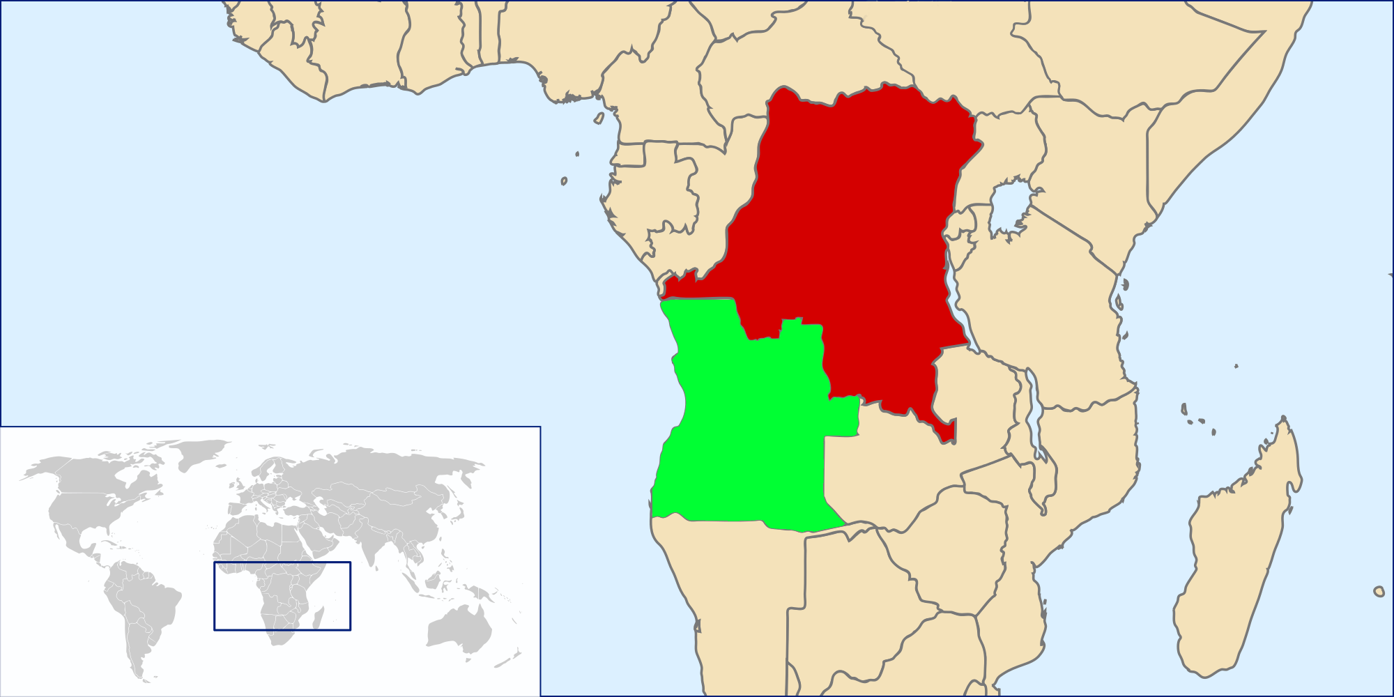 locator map Angola and Zaire